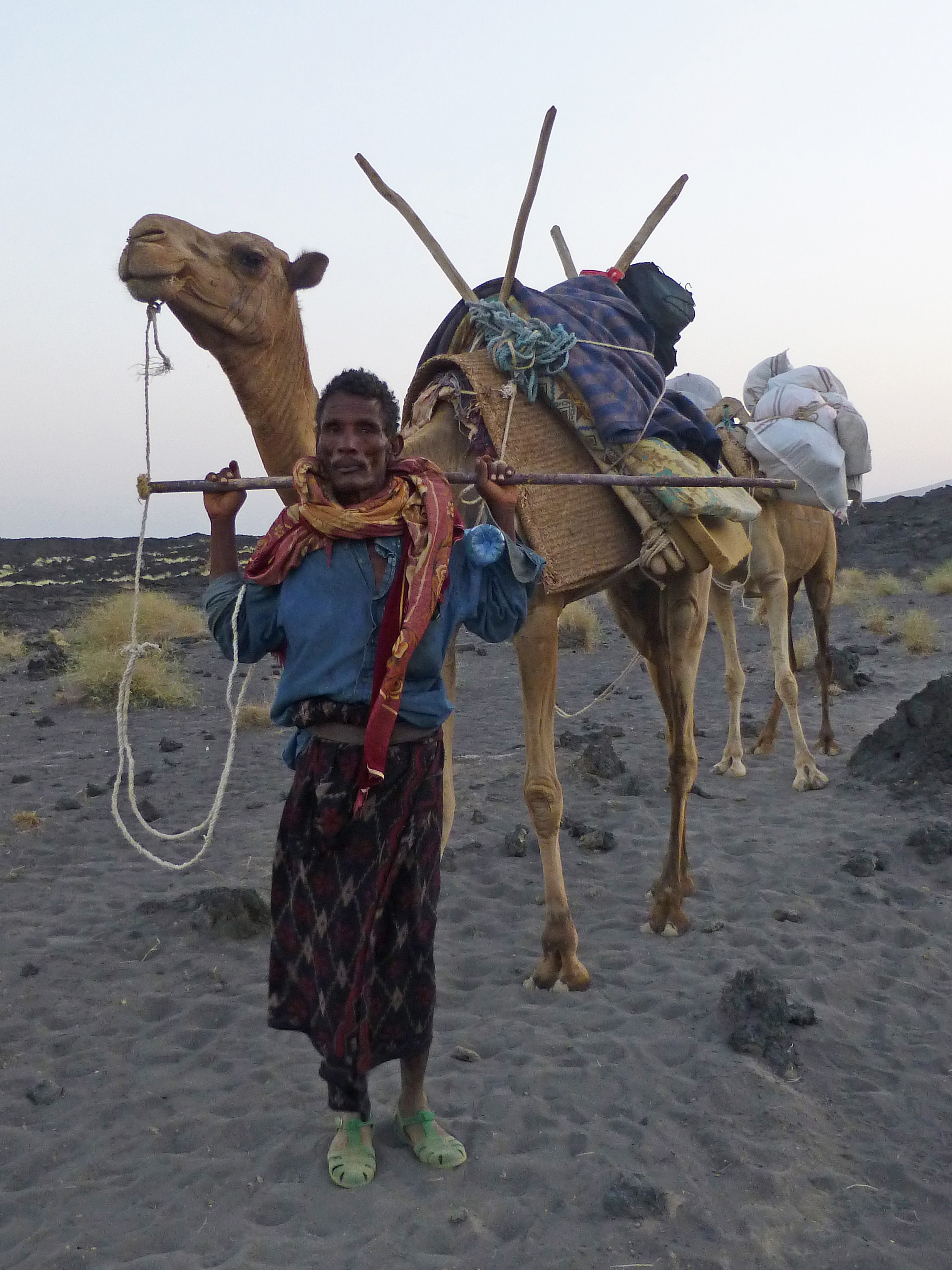 Erta Ale (Ethiopie, région Afar, Danakil) : chamelier Afar